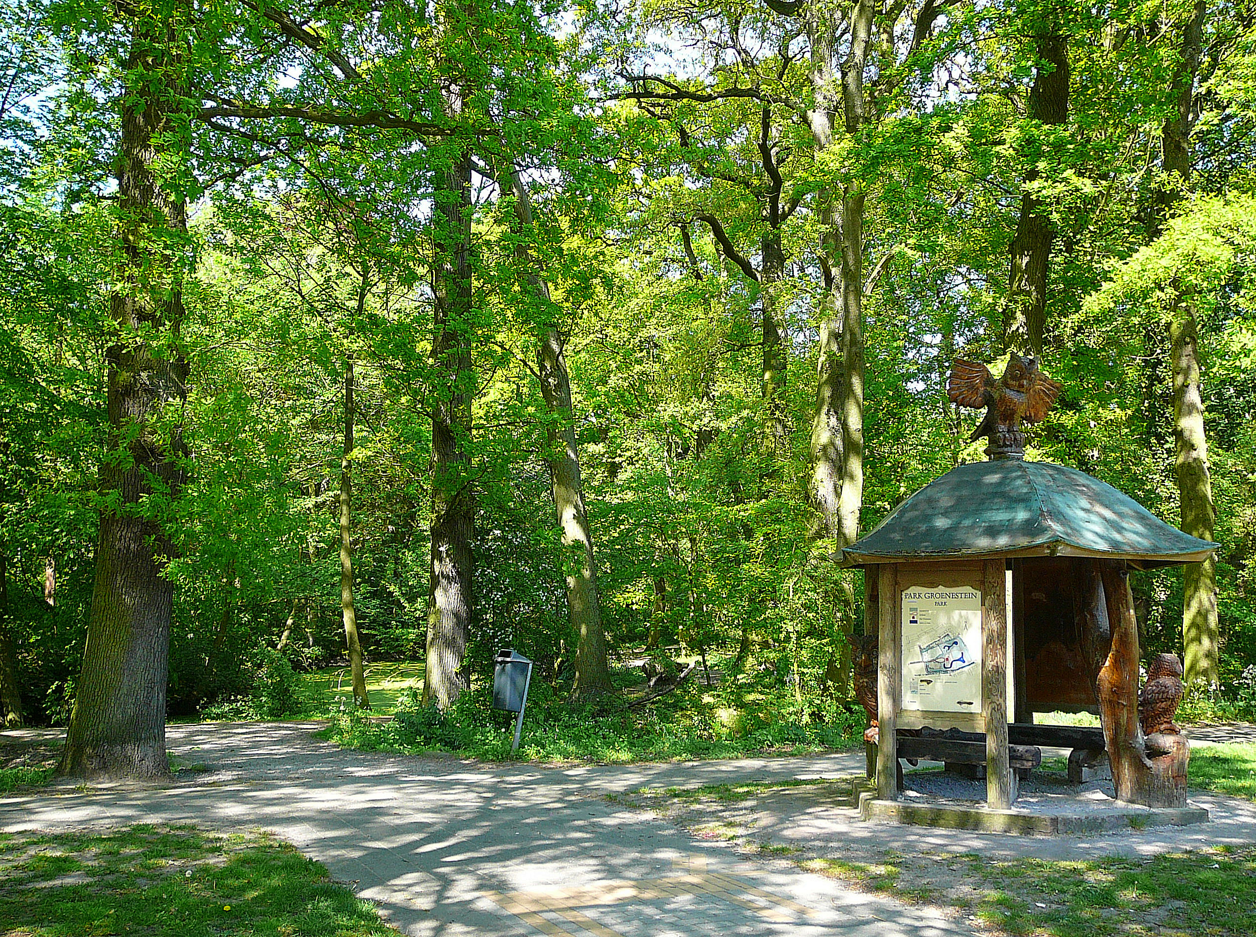 Oostelijke ingang aan de Helper Brink van park Groenestein, Groningen.